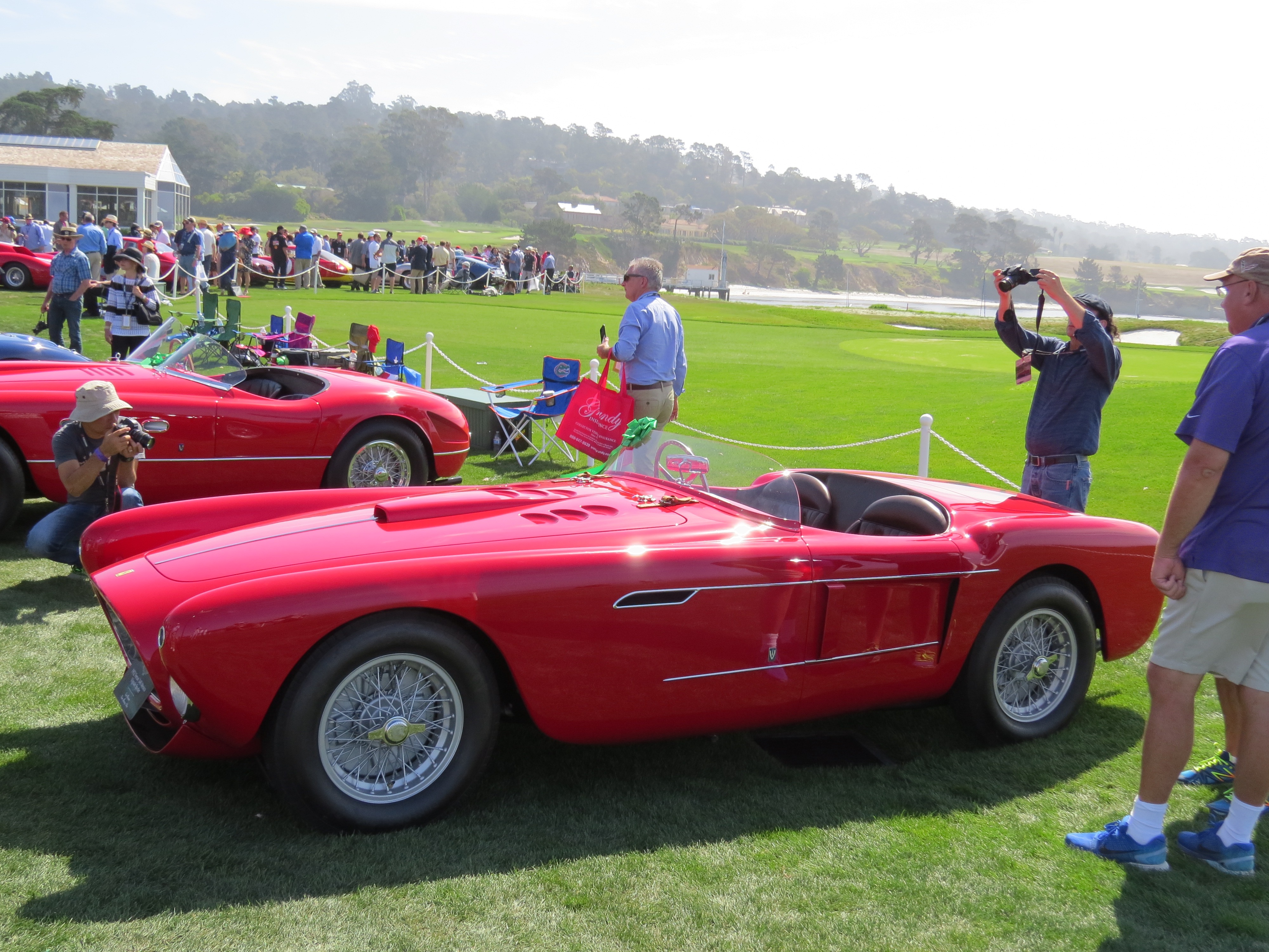 Pebble Beach 2015